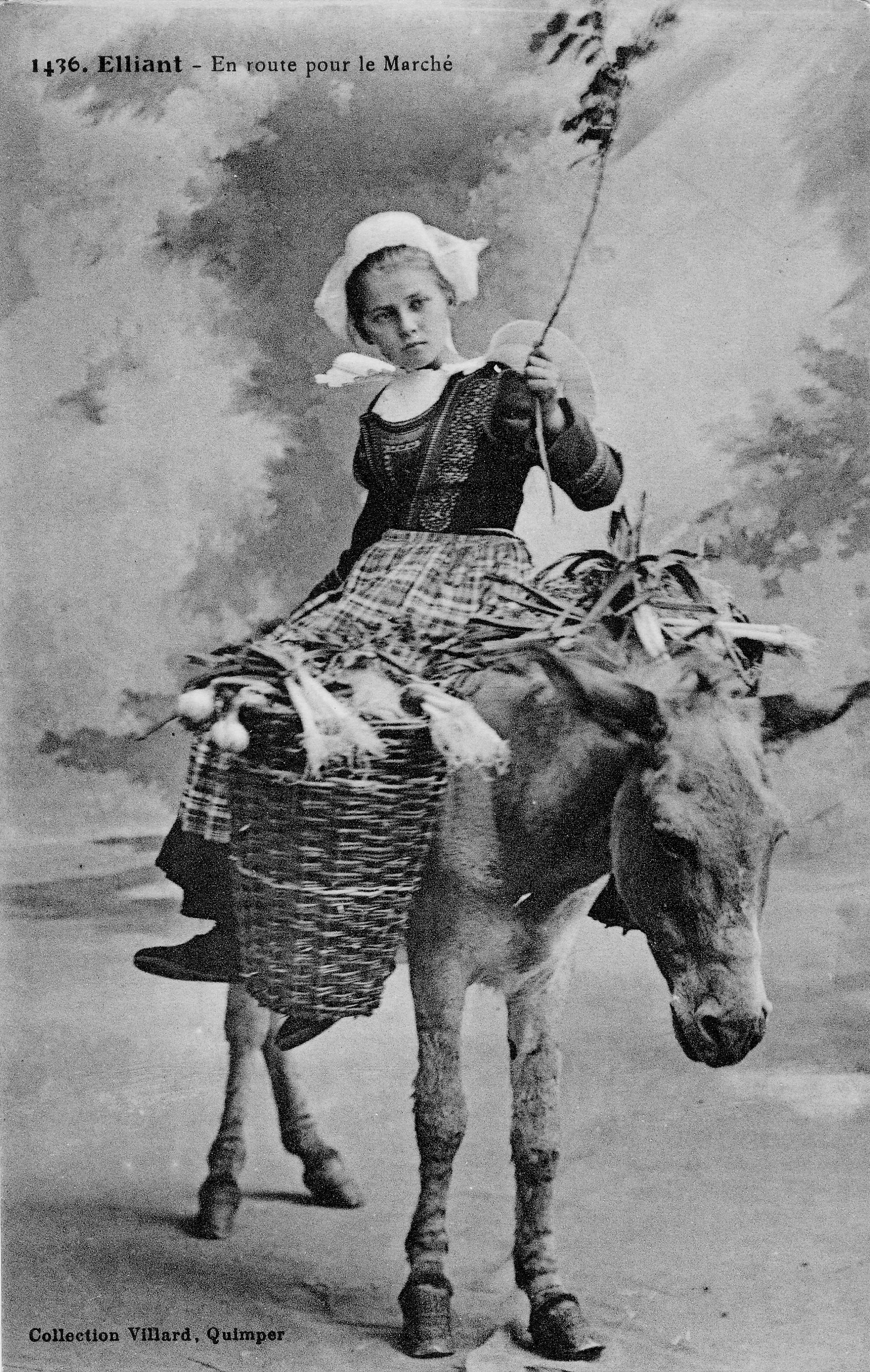 Elliant : En route pour le marché" (carte postale Villard ; probablement vers 1930).